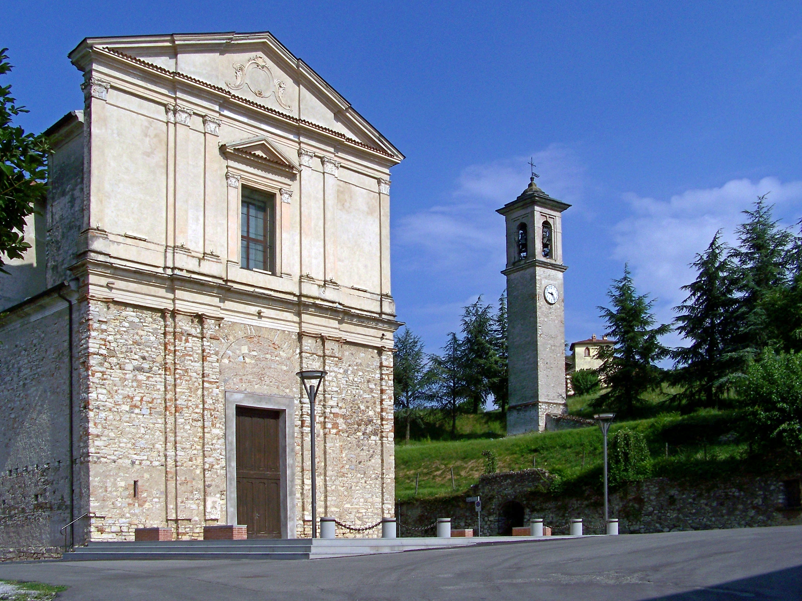 Facciata e torre campanaria della Chiesa di San Vitale a Borgonato.